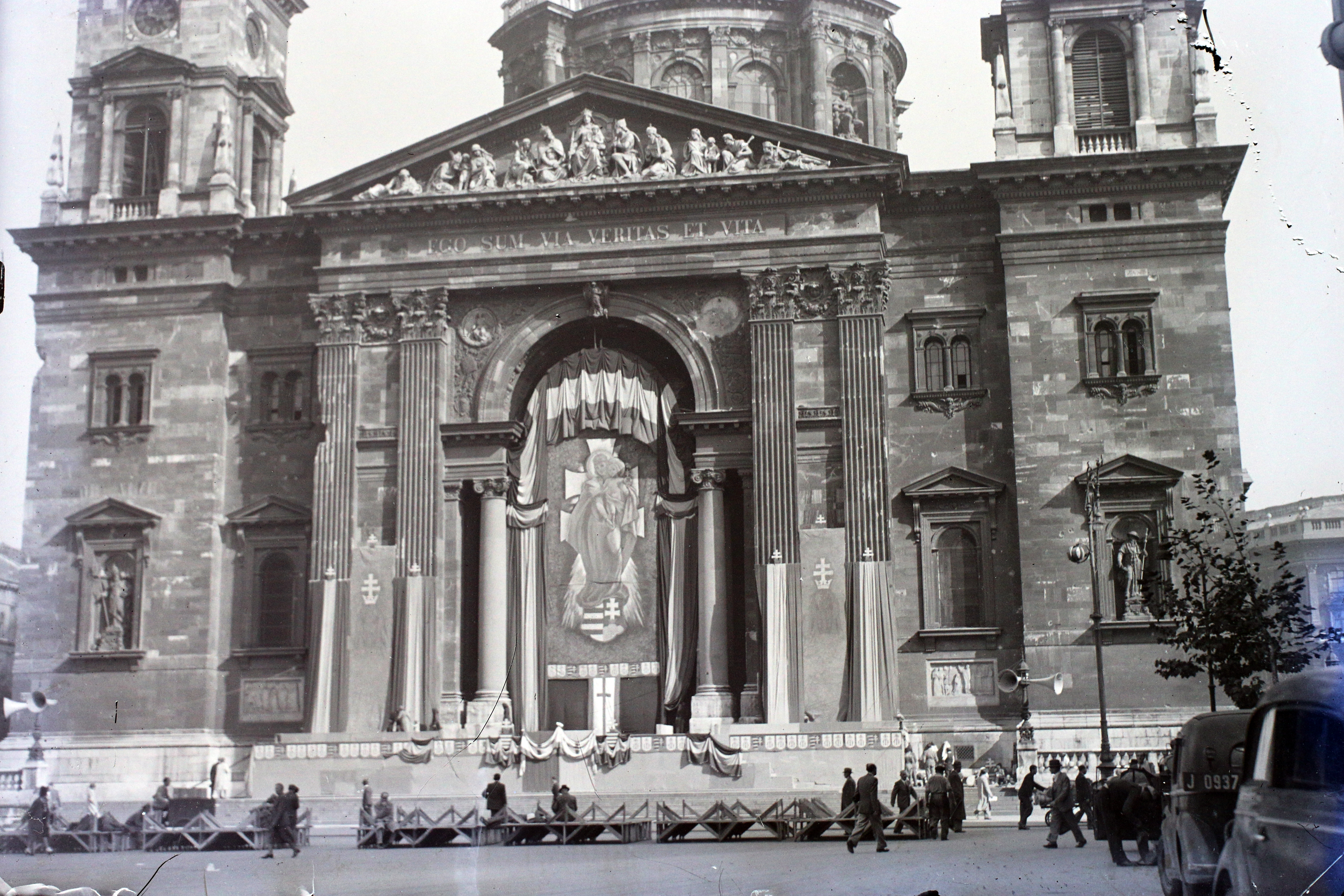 Szent István tér, Szent István-bazilika (Ybl Miklós, 1906.). Location: Hungary, Budapest V. Tags: Budapest, crest, Miklós Ybl-design Title: Szent István tér, Szent István-bazilika (Ybl Miklós, 1906.).